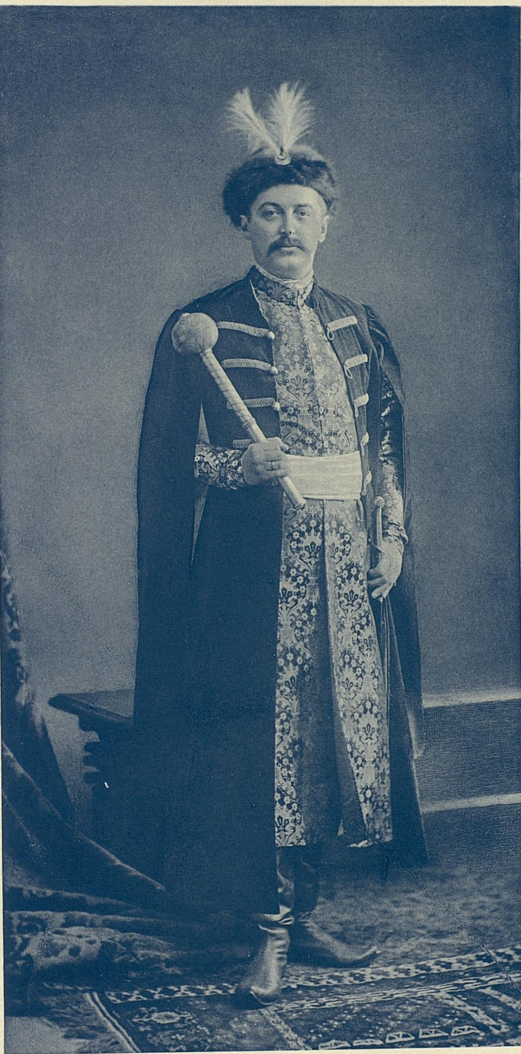 Свиты Его Величества генерал-майор, Князь Виктор Сергеевич Кочубей, в одеждах полковника войска Запорожского.